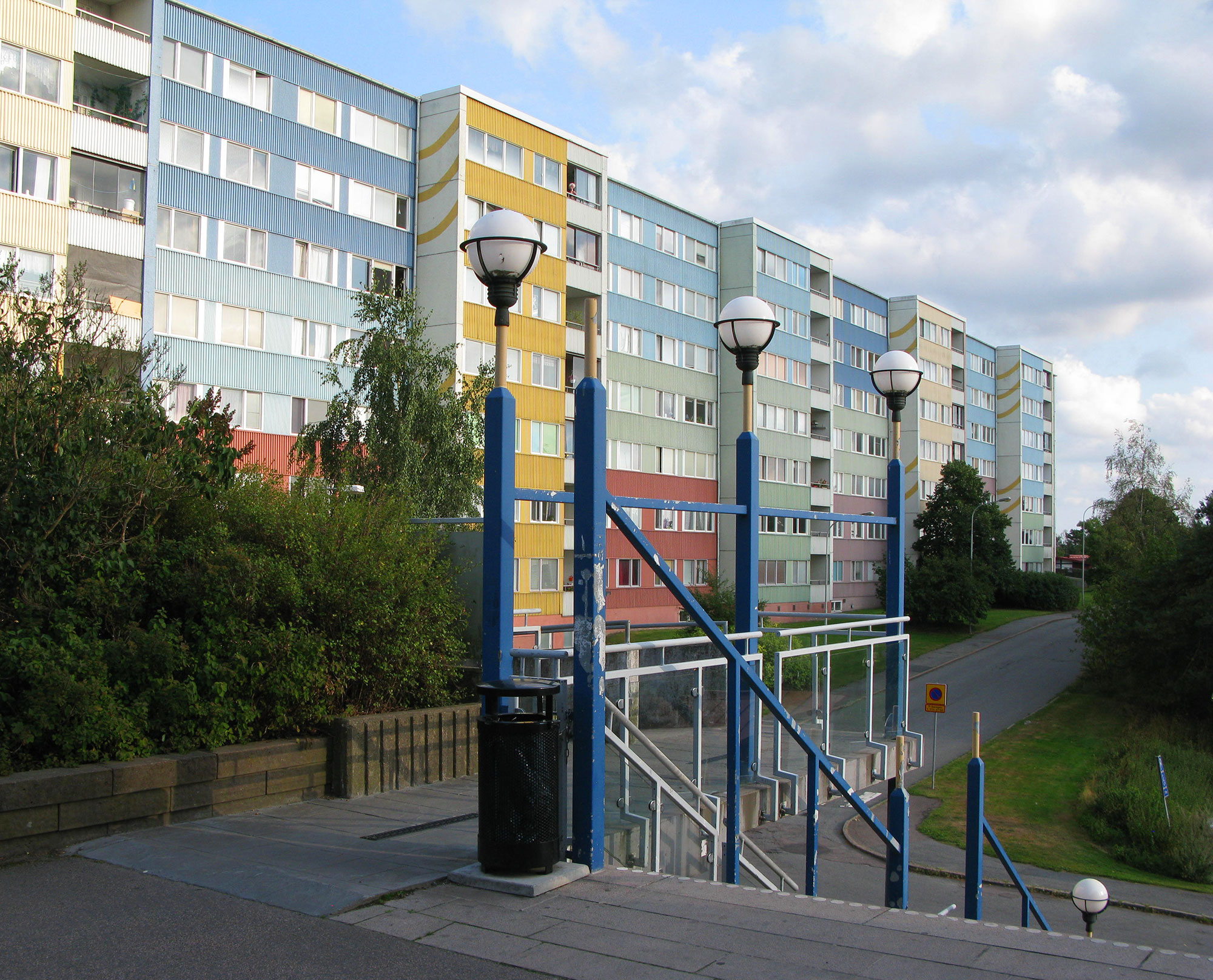 Housing estate on Siriusgatan, Bergsjön, Göteborg